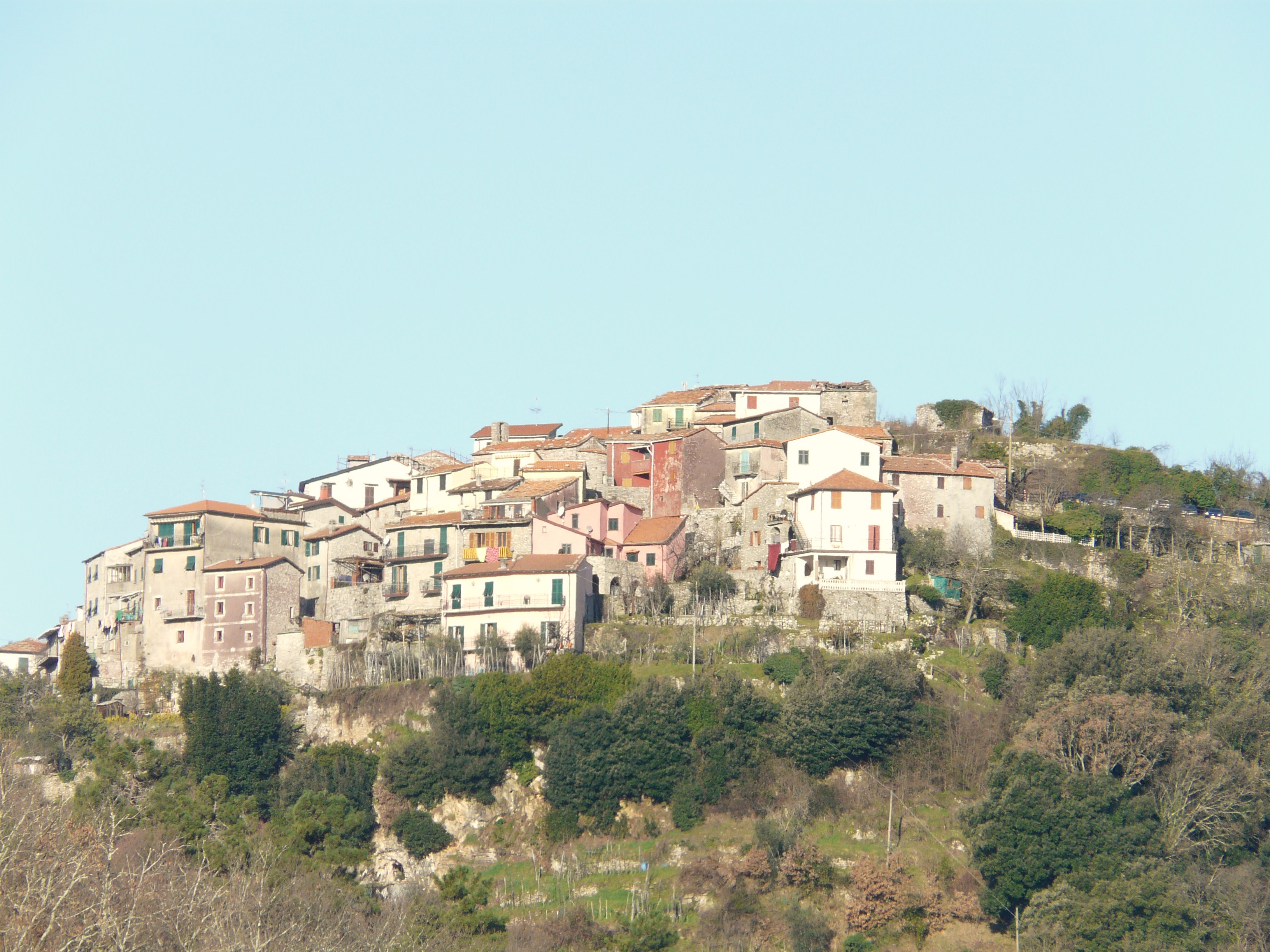 Ponzò, Riccò del Golfo di Spezia, Liguria, Italia